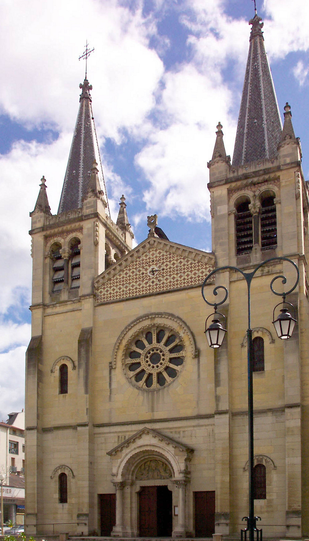 Église à Vichy (photo personnel d' Utilisateur:FRED 2004)